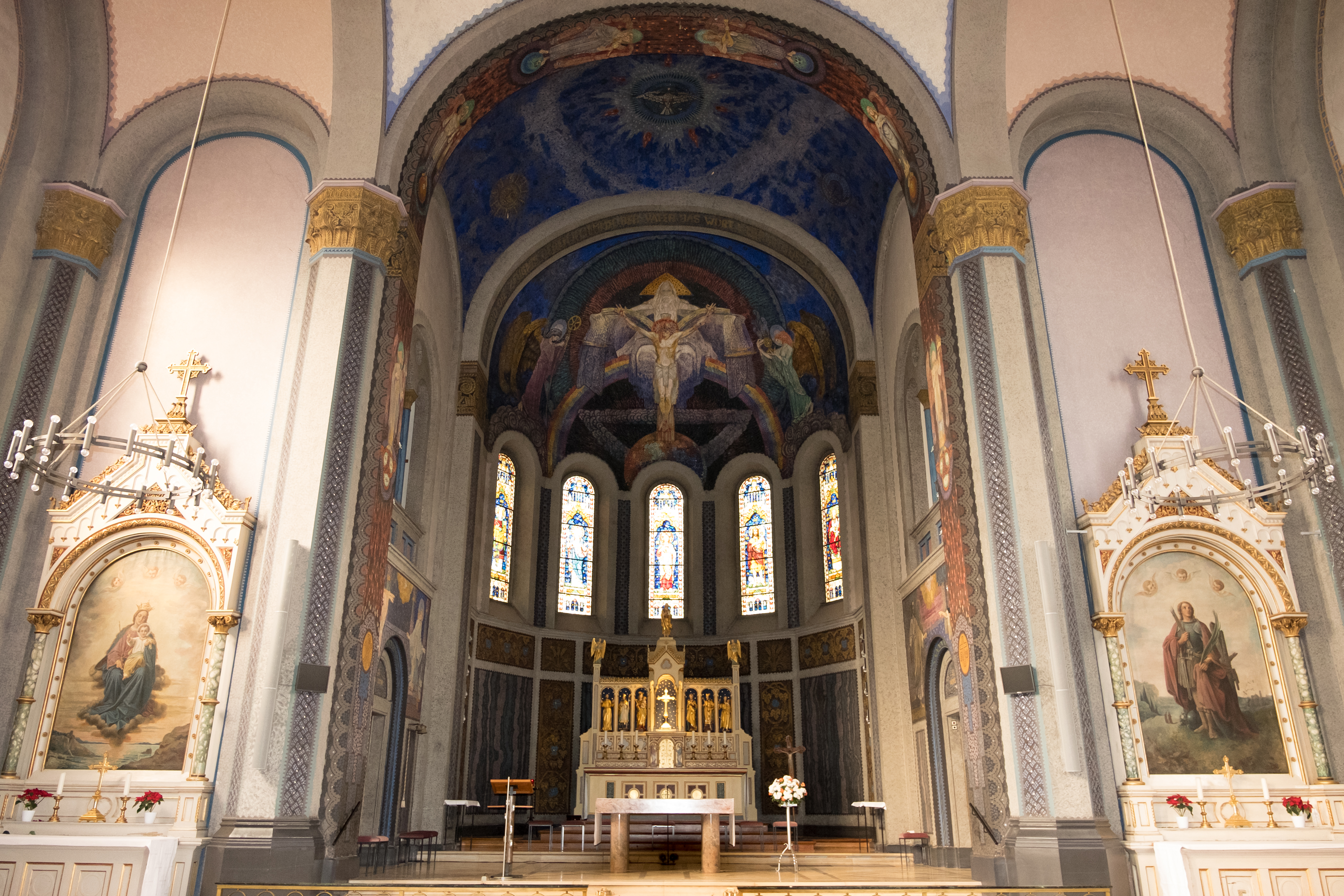 Seitenaltäre und Apsis des "Taunusdoms" Pfarrkirche St. Johannes in Kirdorf